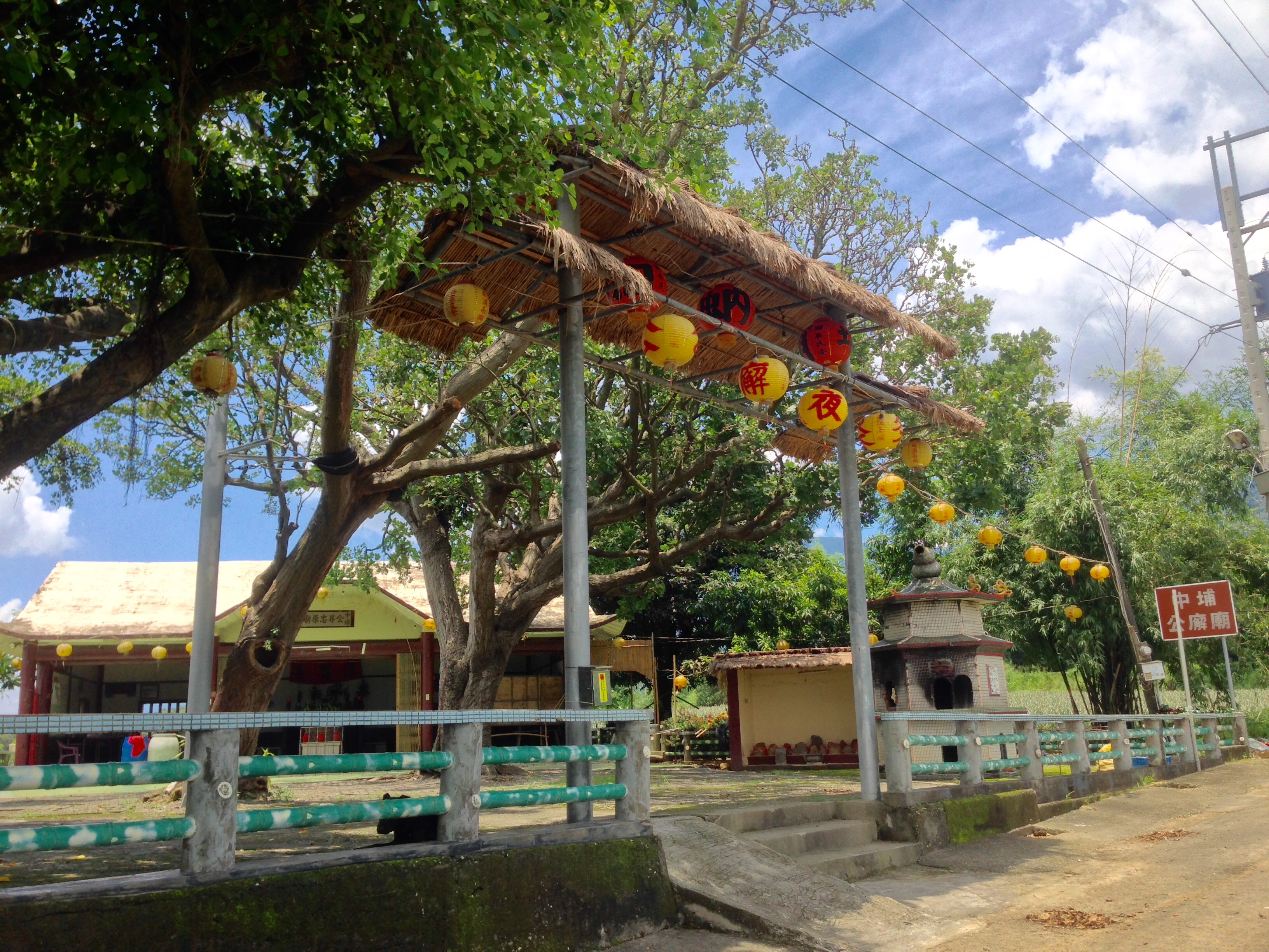 中埔公廨廟牌枋